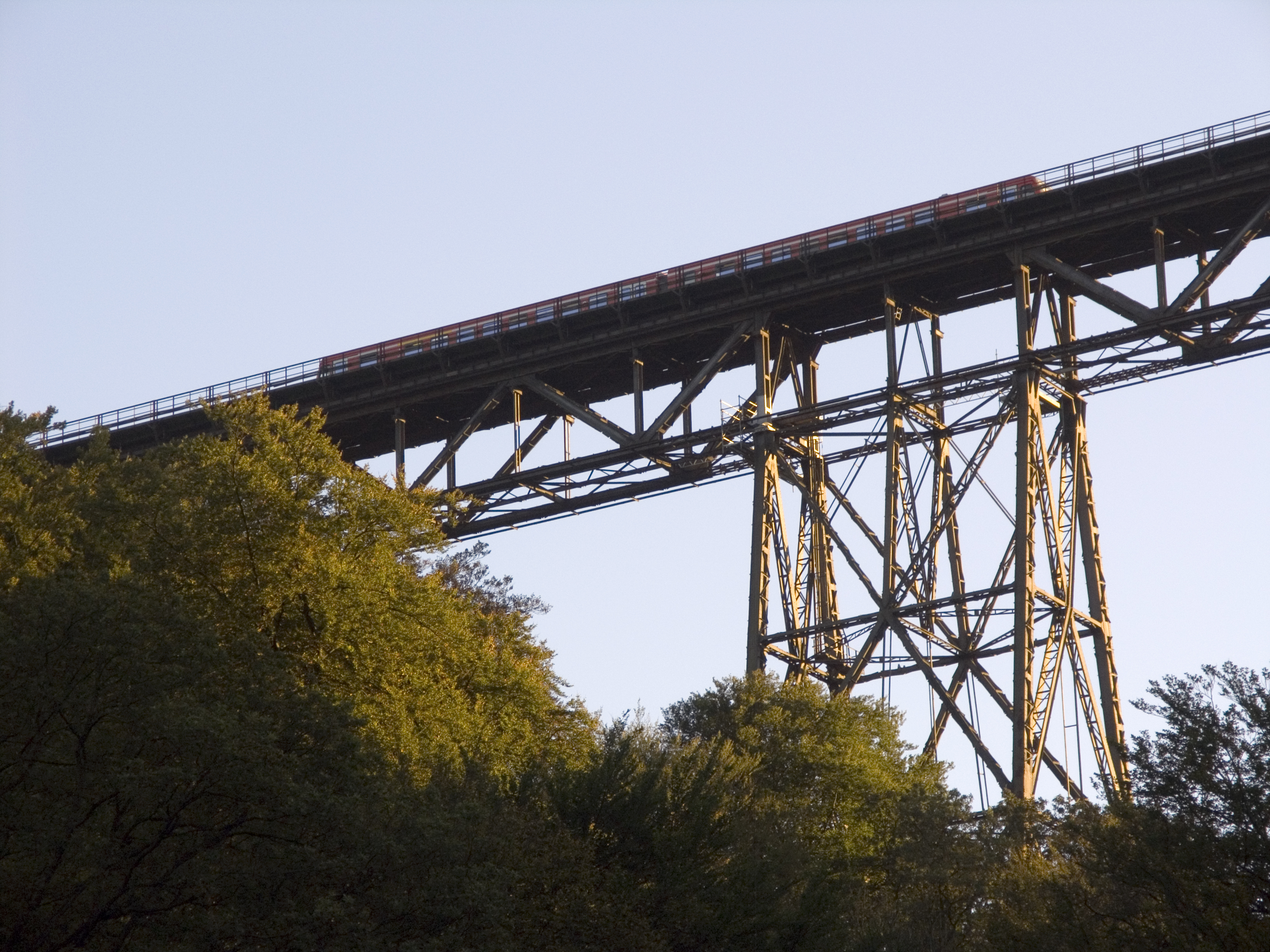 Северный Рейн - Вестфалия, Золинген - Мост Mungstener